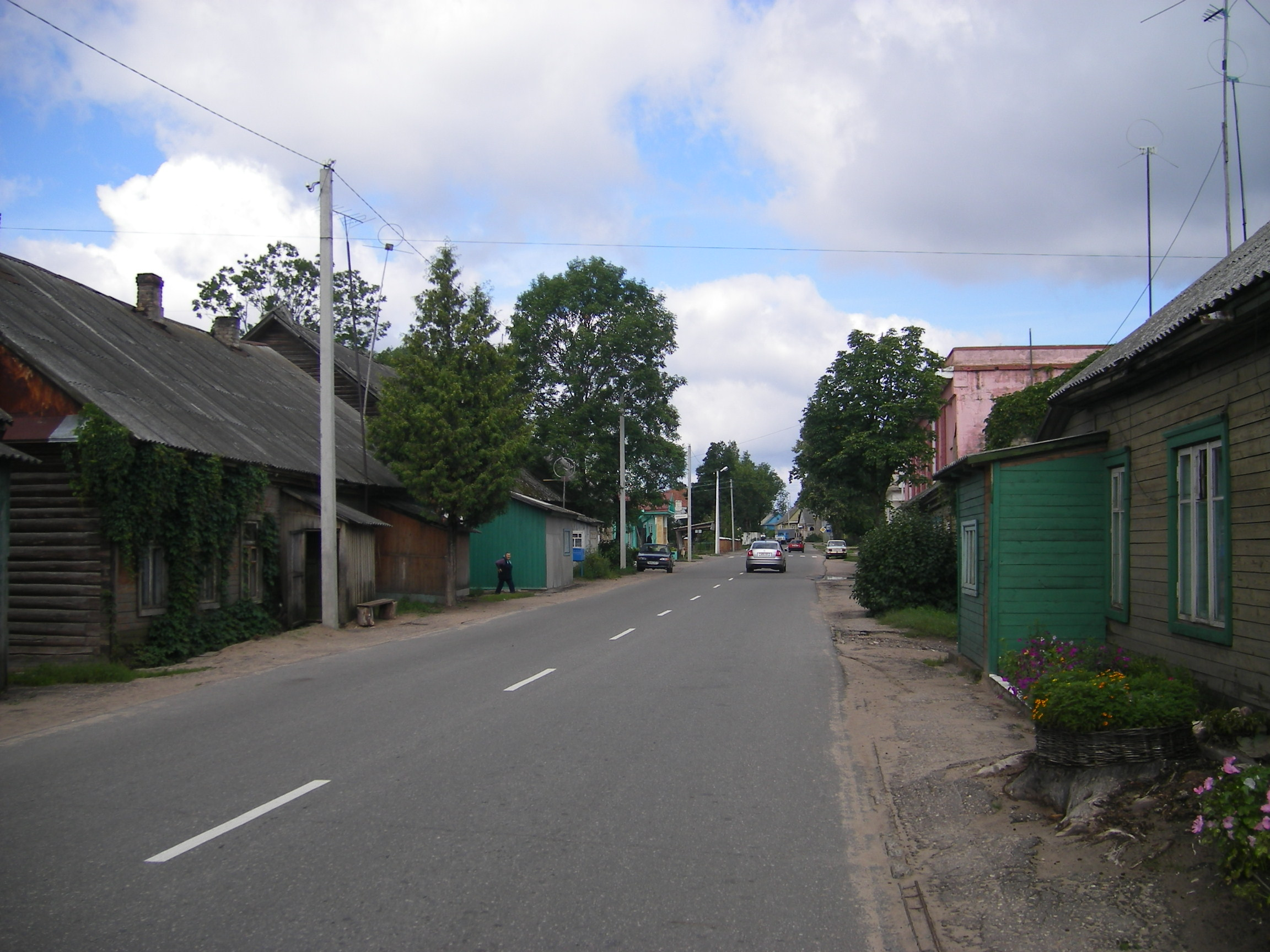 Braslav, Lenin Street